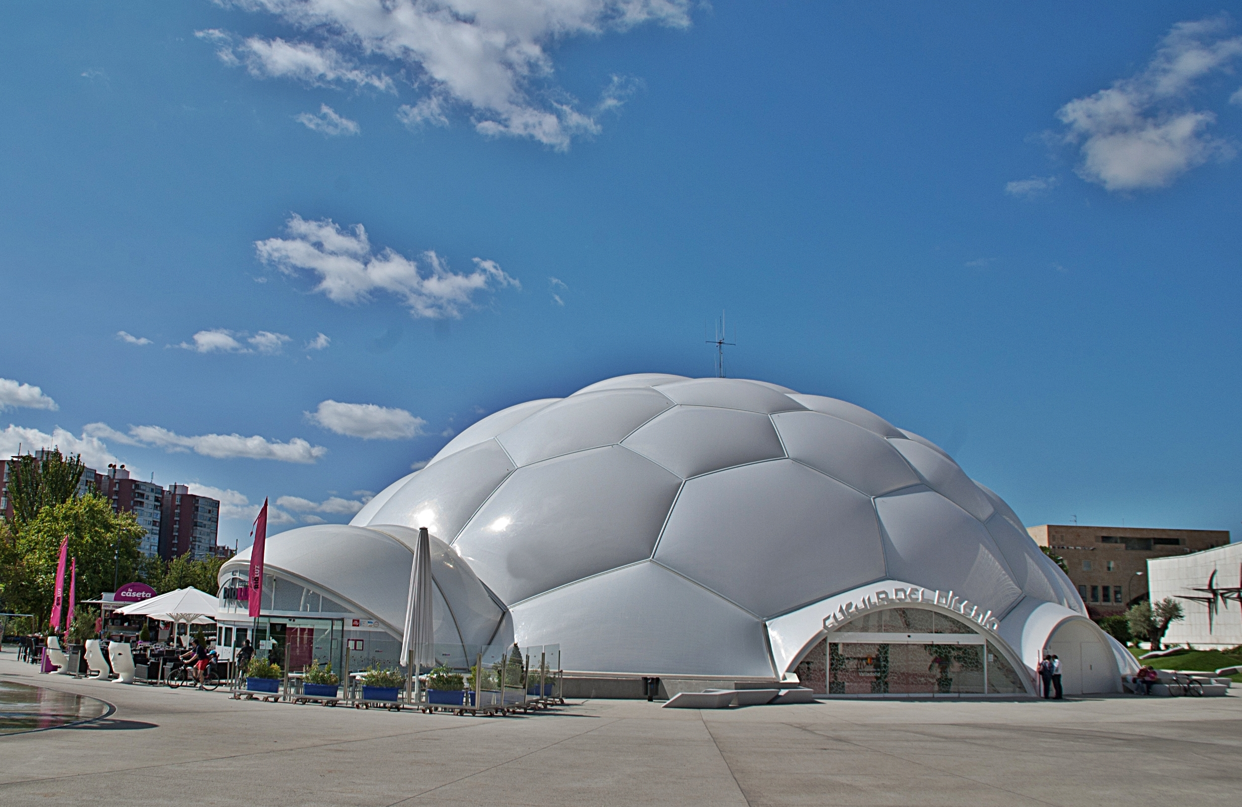 Cúpula del Milenio, Valladolid